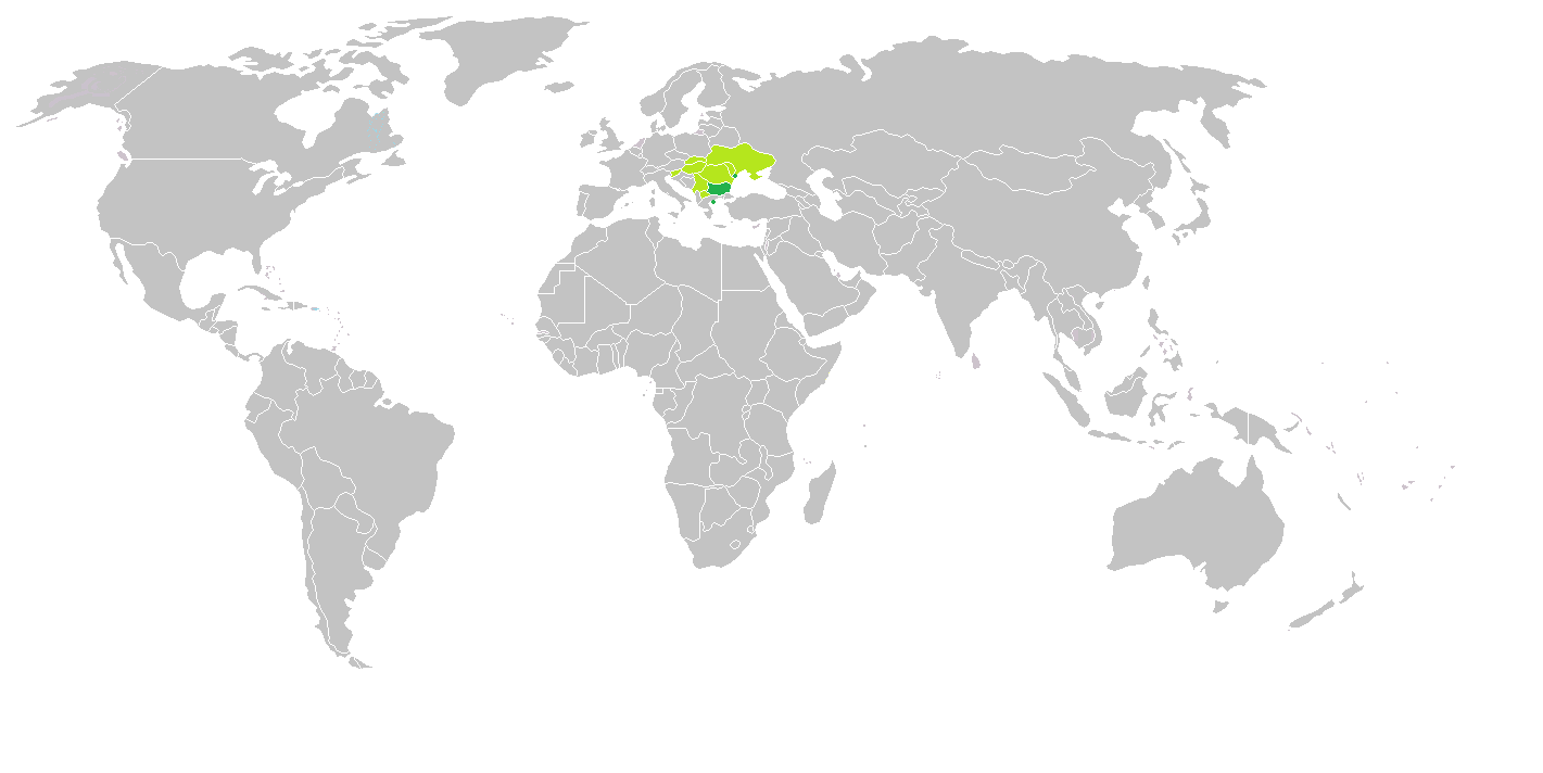 Граници на българския език